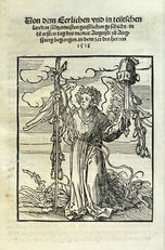 Jakob Mennel: Uon dem Eerlichen vnd teutschen landen seltzamesten gaistlichen geschicht, in de[n] ersten tag des monat Augusti zu Augspurg begangen in dem jar des herren 1518. Augsburg: Sigmund Grimm und Marx Wirsung, 1518. Titelholzschnitt